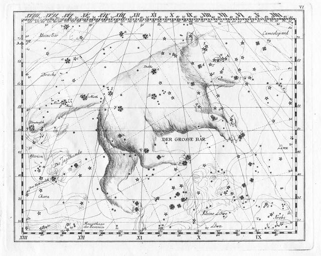 Das Sternbild Grosser Bär aus dem Sternatlas von Johann Elert Bode von 1782.